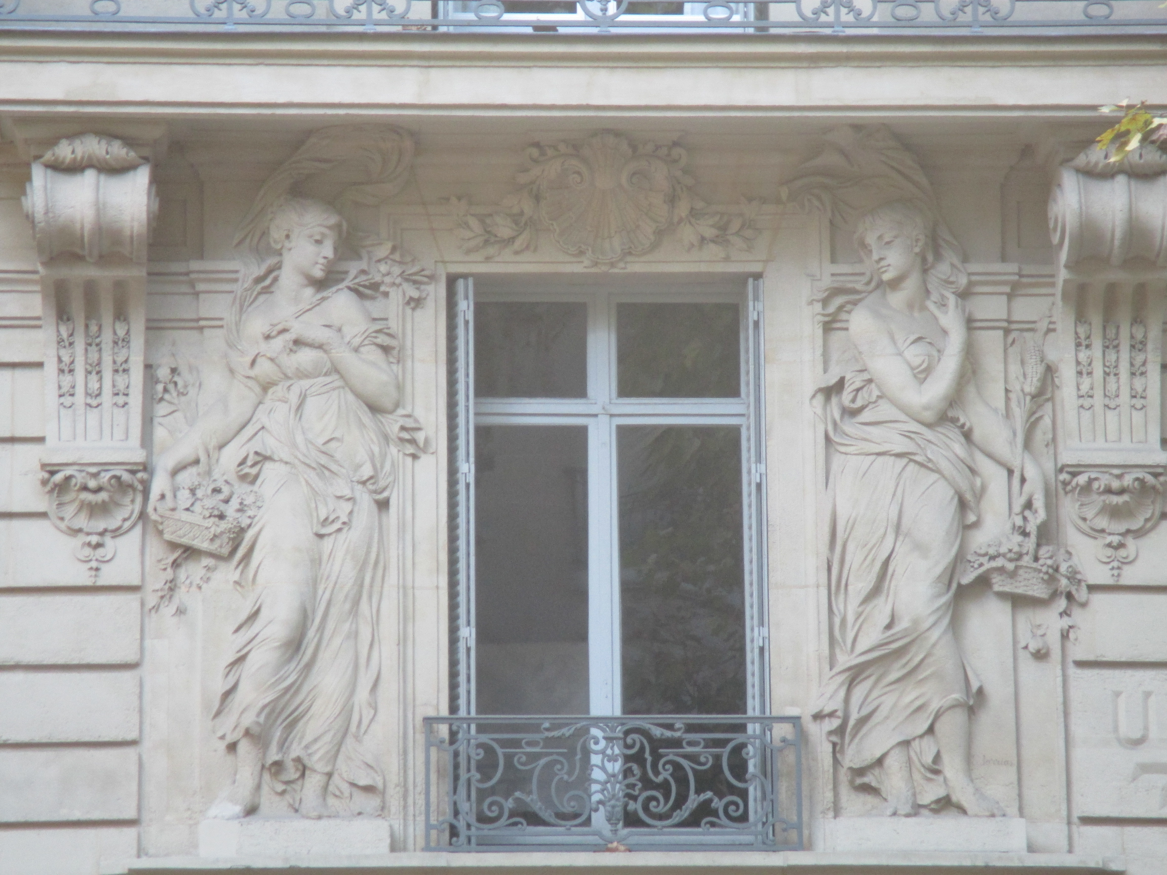 Sculptures au 30 avenue de Messine.